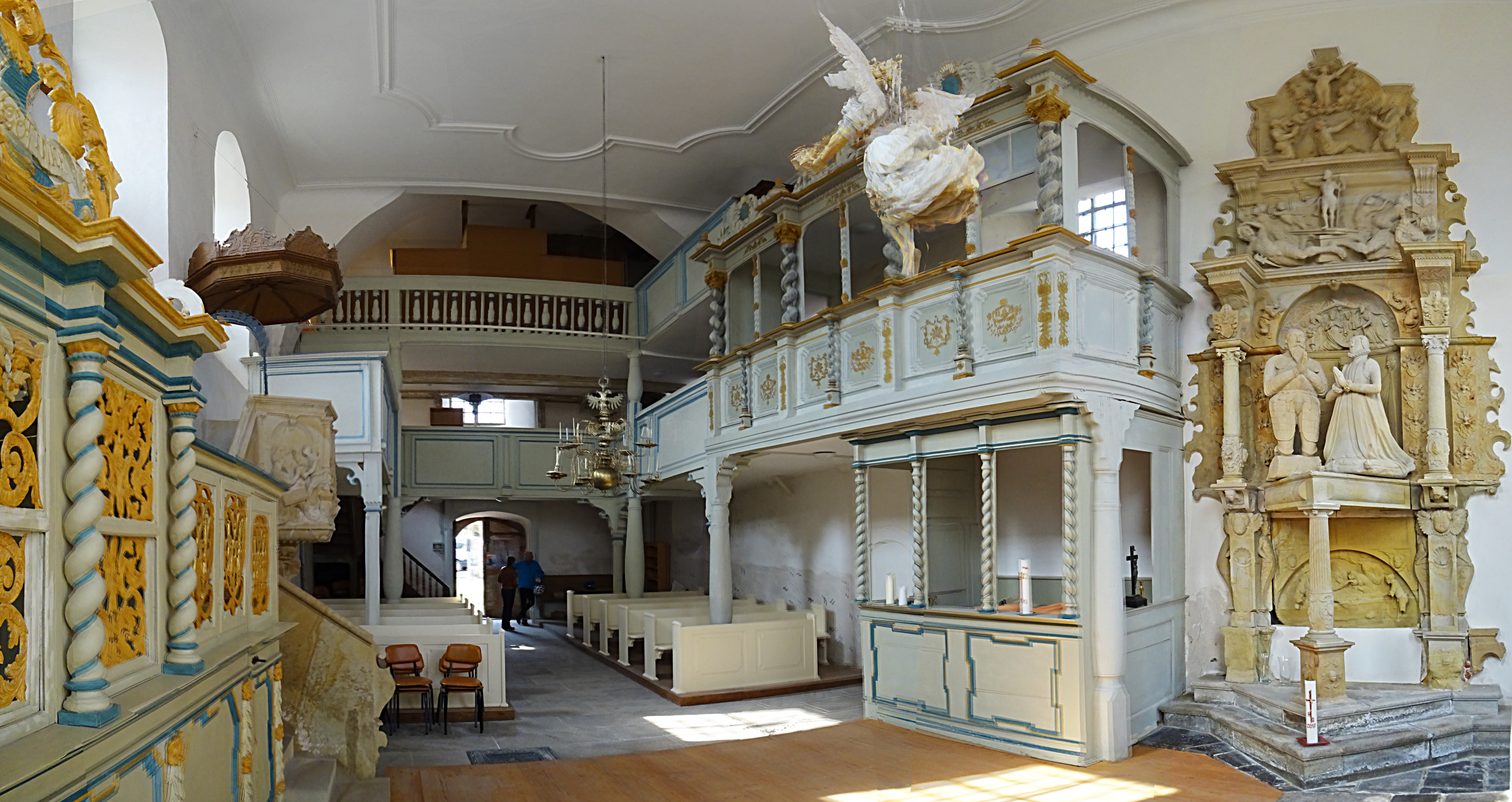 St. Philippus Kirche in Kleinwerther